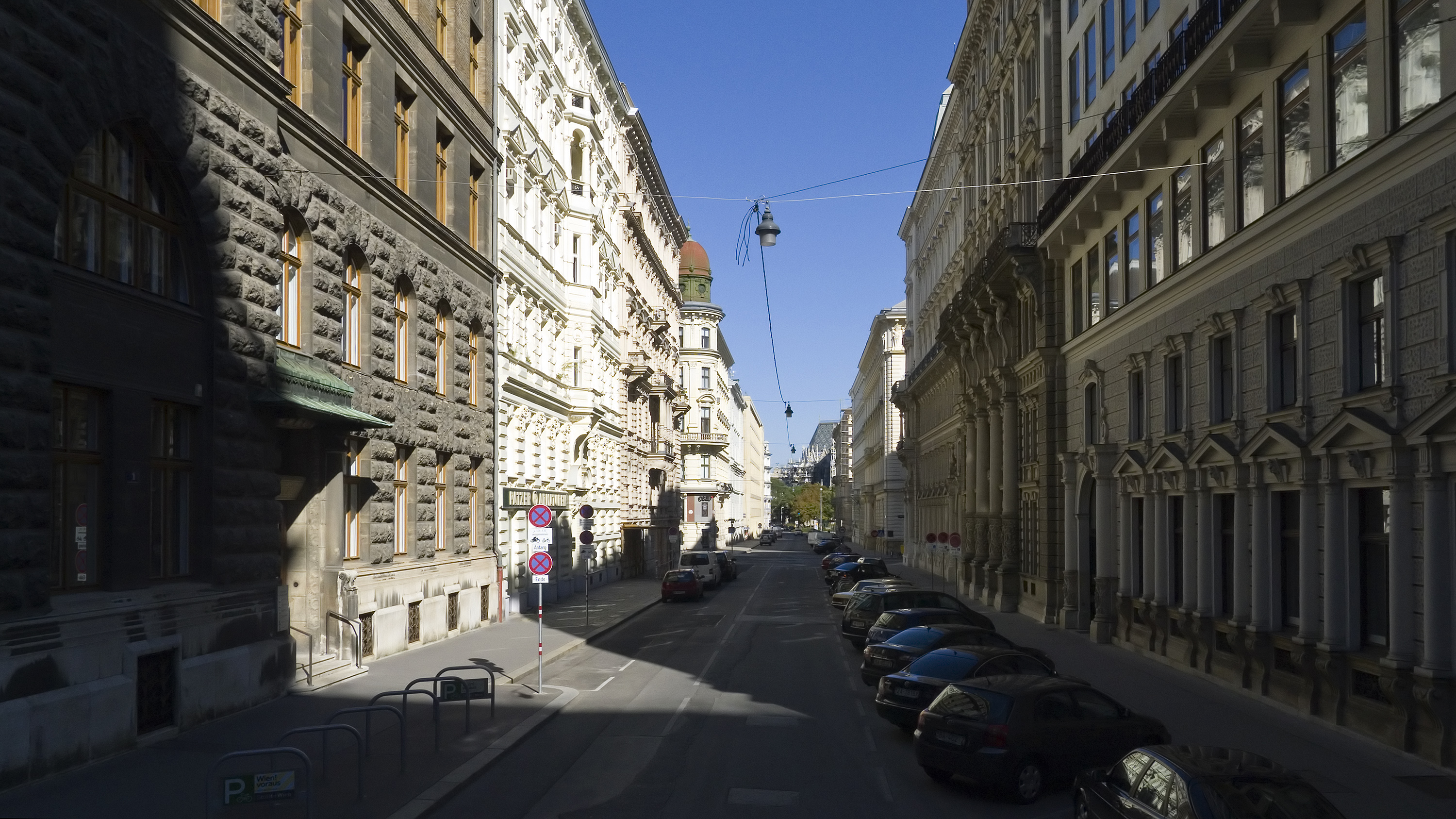 Ebendorferstraße in Wien 1 bei Nr. 2 Richtung Norden